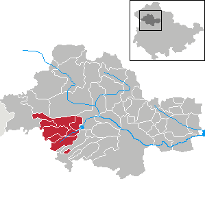 frühere Verwaltungsgemeinschaft Vogtei in Thüringen - Unstrut-Hainich-Kreis